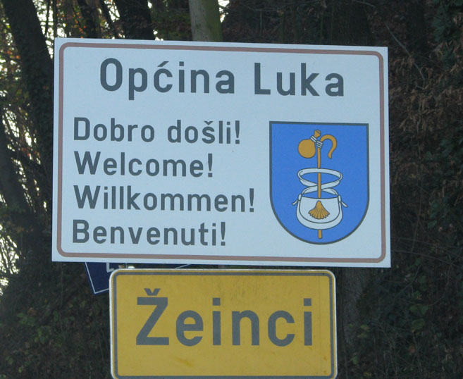 Uvítací tabule před příjezdem na území obce (općiny) Luka, Chorvatsko